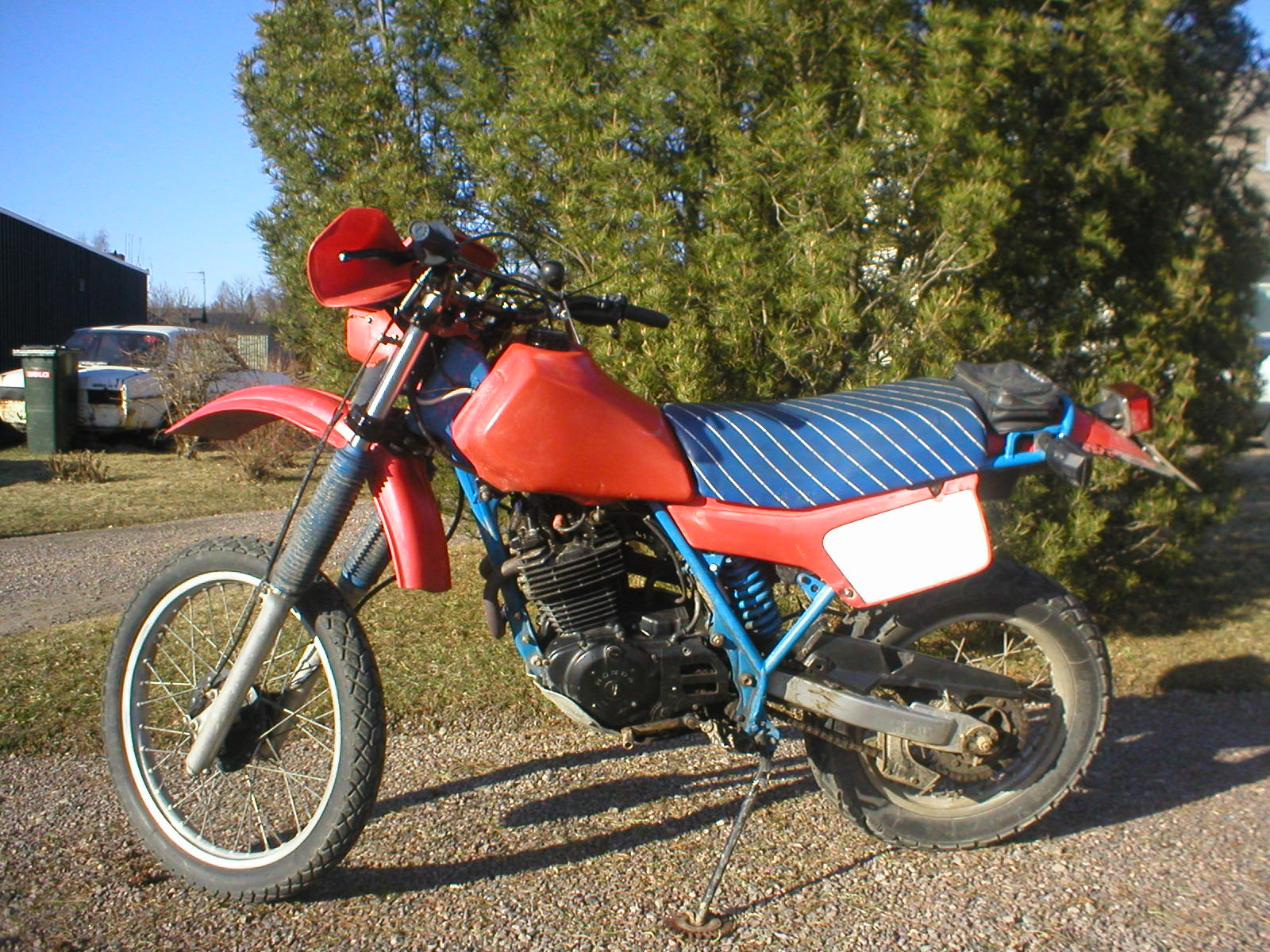 Honda XR500R 1982, vänster sida